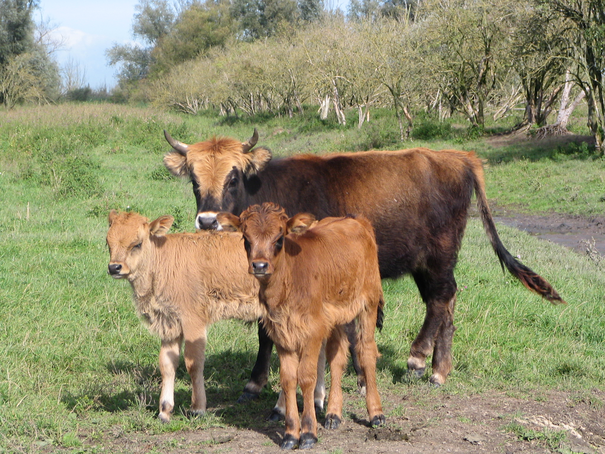 Eigen opname. GerardM A Heck cattle group, in Oostvaardersplassen, a nature reserve in Netherlands.